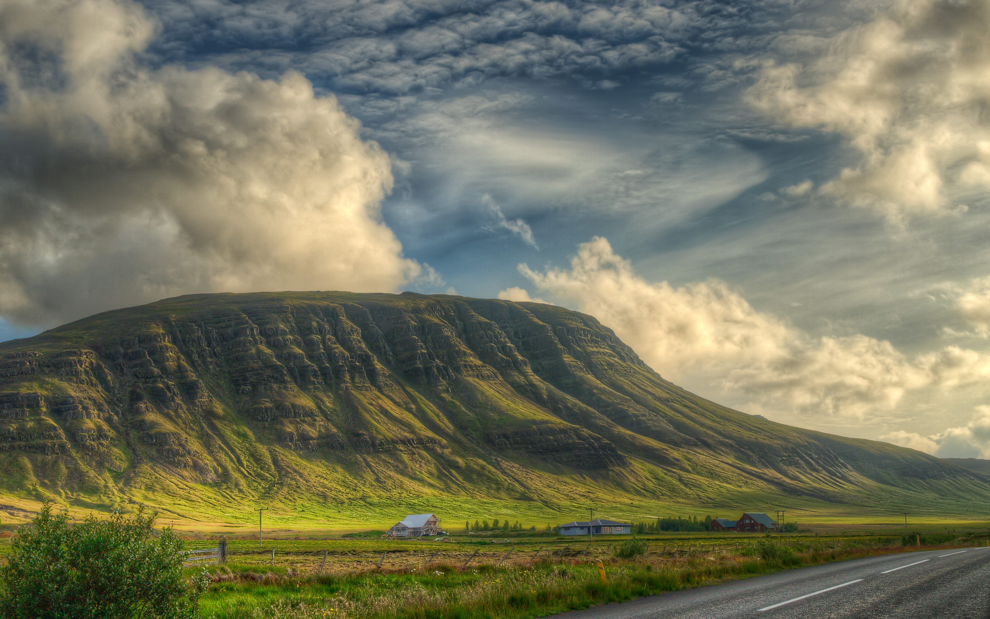 Eyrarfjall